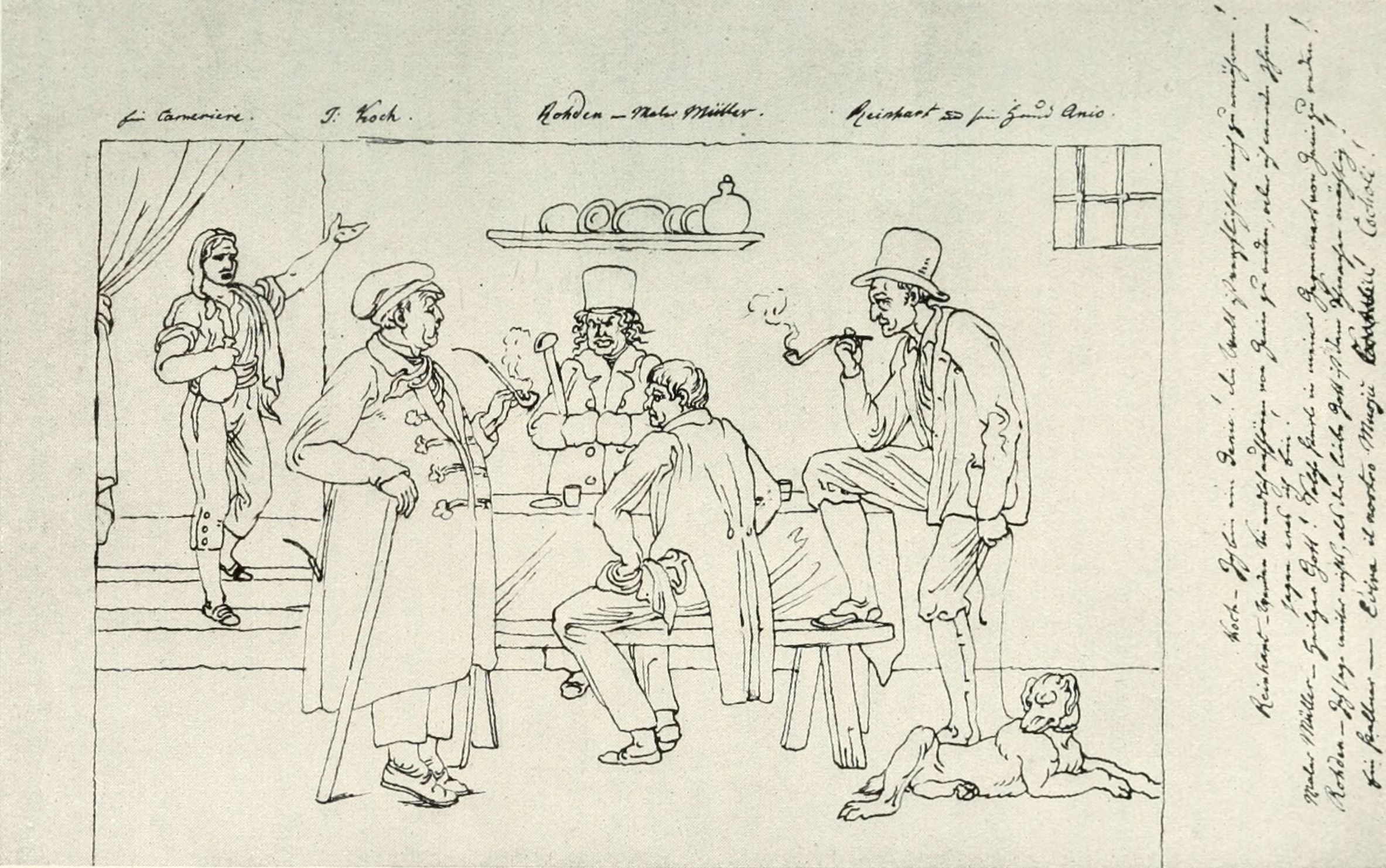 From right to left: Johann Christian Reinhart, Maler Müller, Johann Martin von Rohden, Joseph Anton Koch, the waiter.